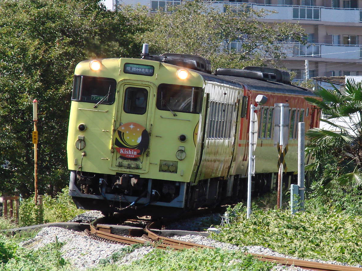 JR西日本 キハ40形気動車